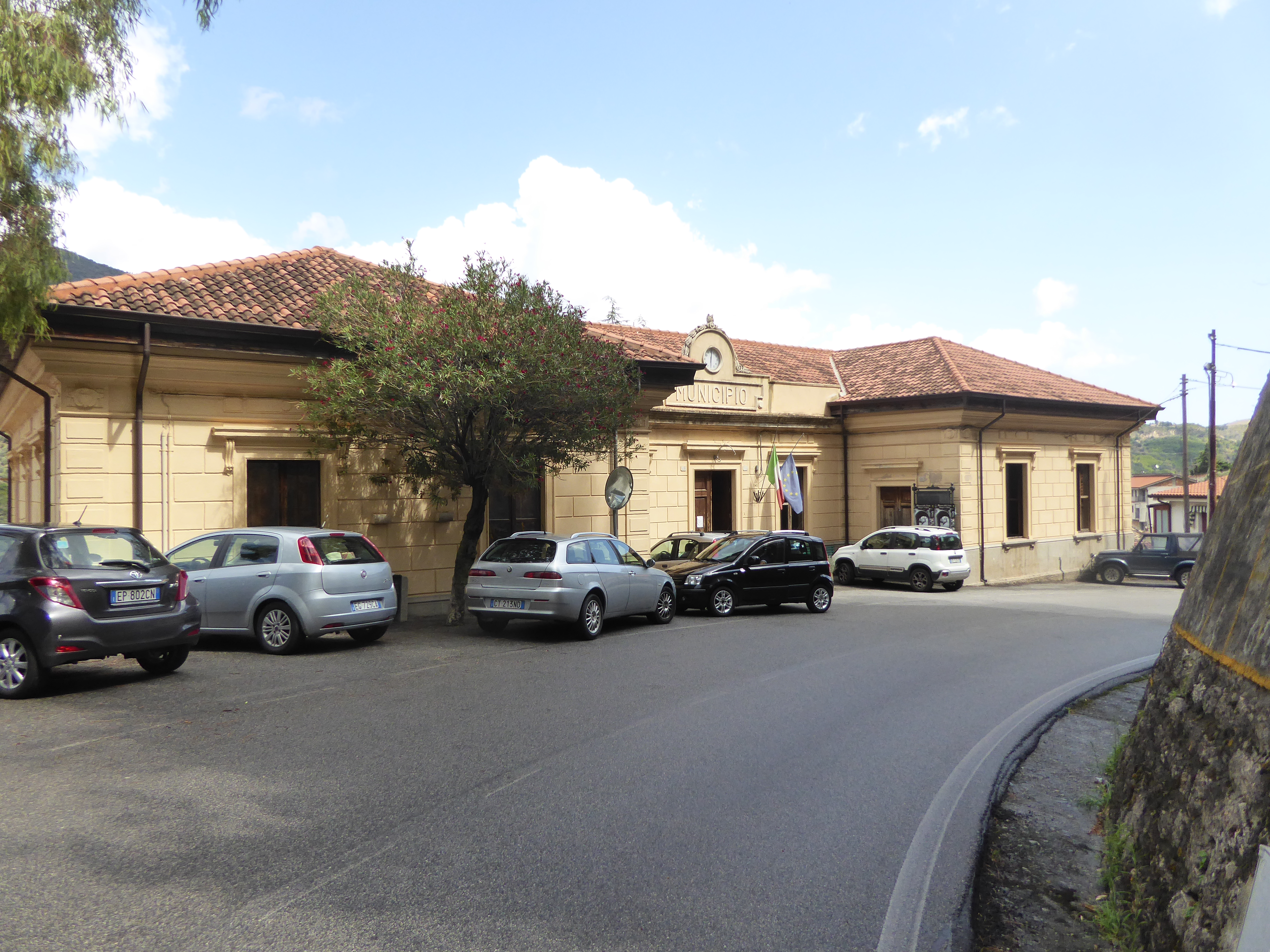 Municipio di Bivongi (2018)